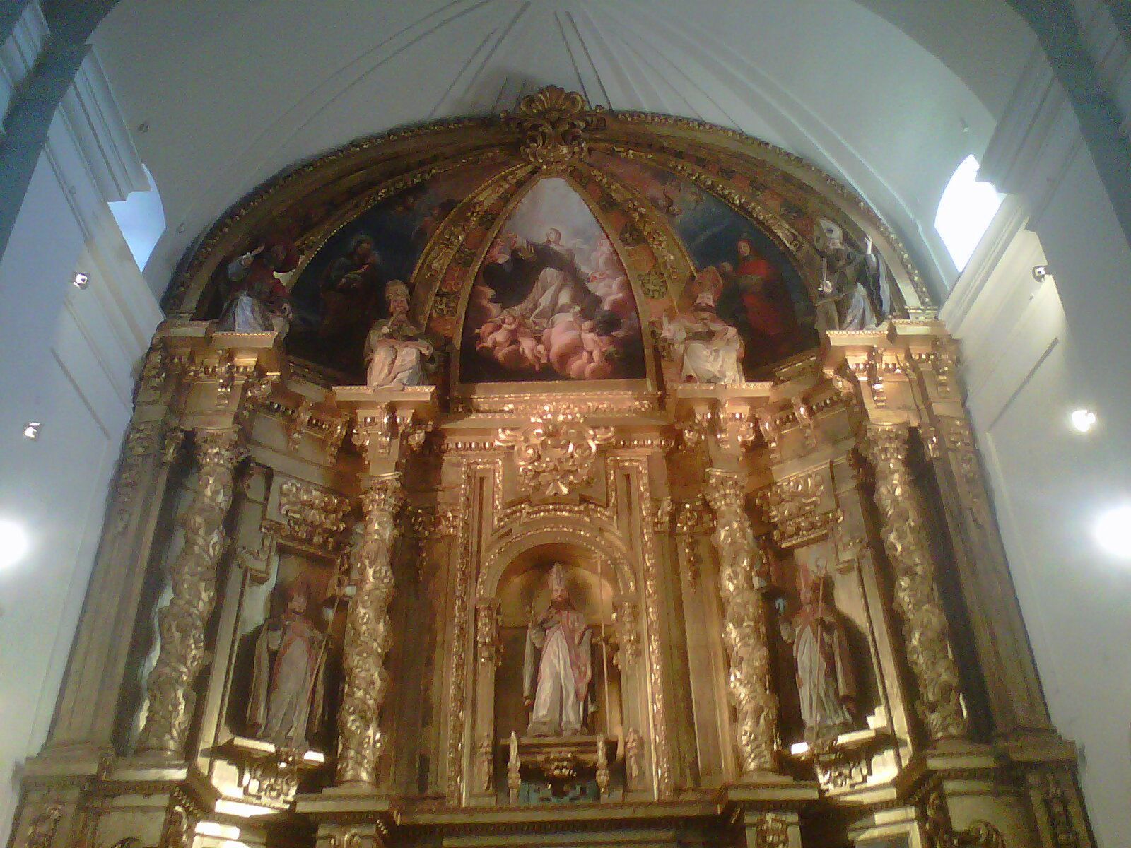 Vista de la Parte superior del retablo barroco de la iglesia de San Julián.